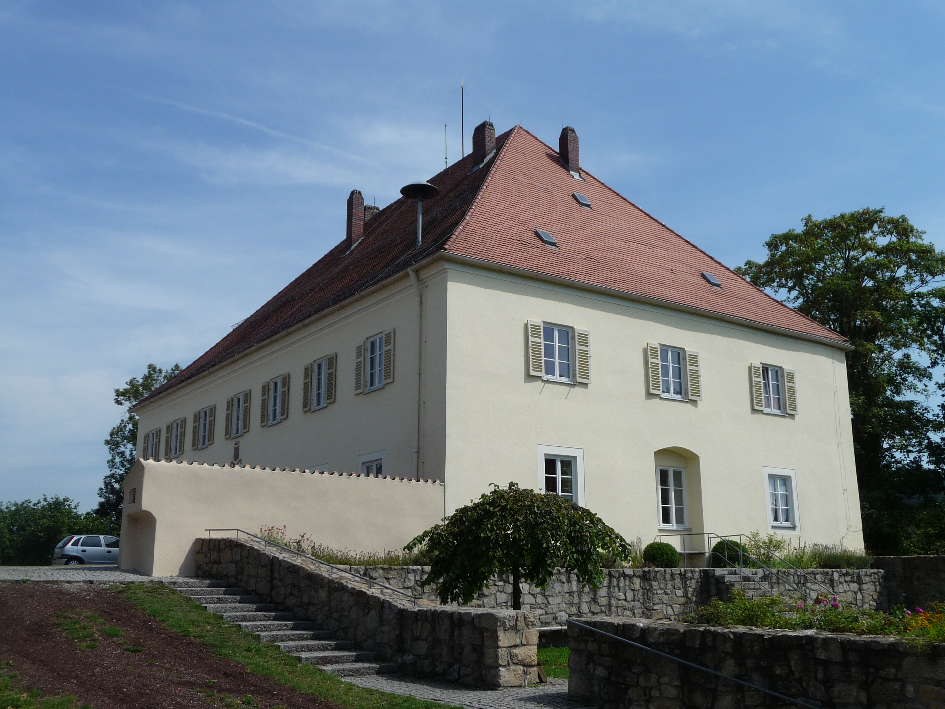 Das Rathaus (ehemaliges Schloss) von Mitterfels